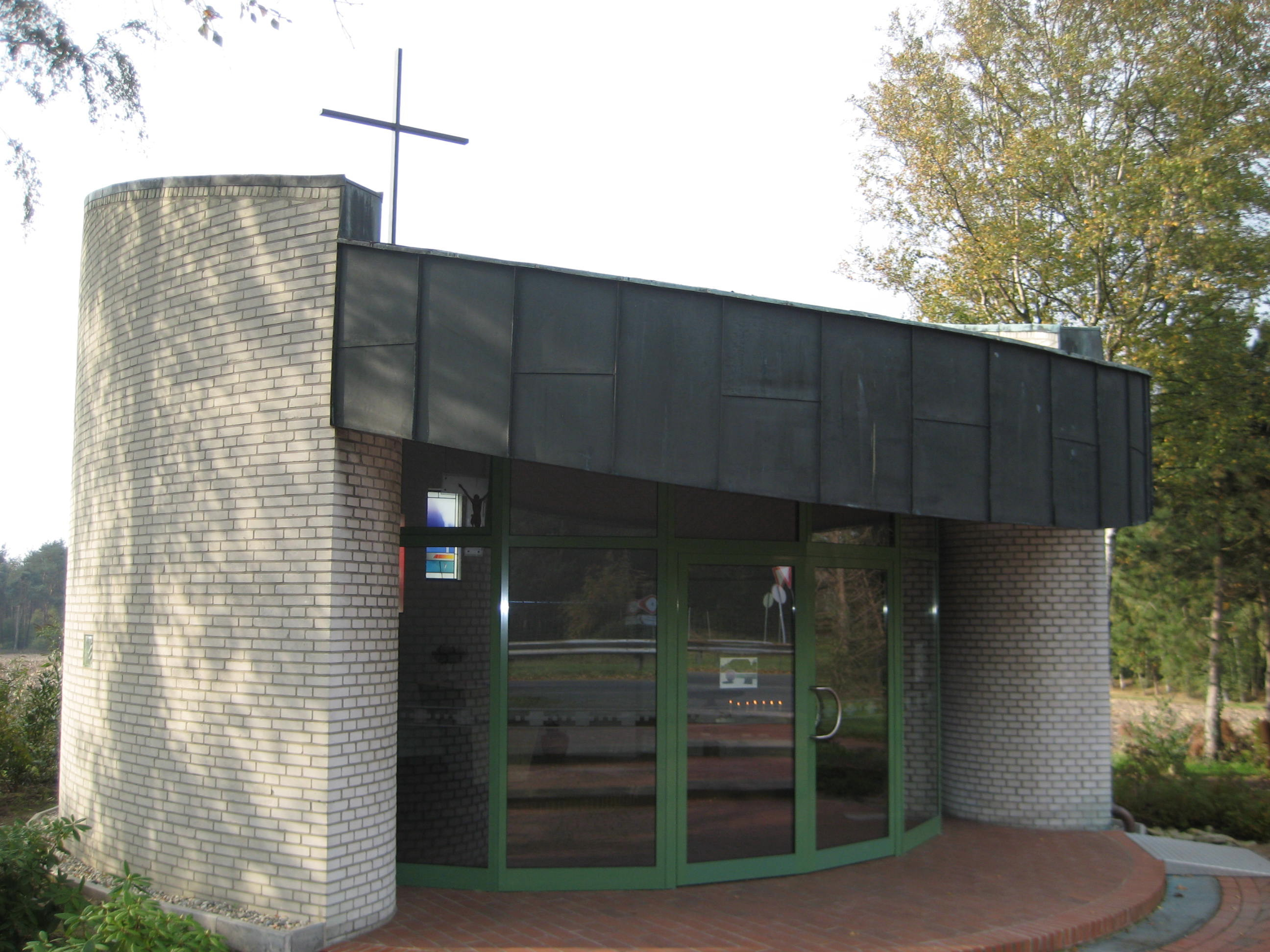 Autobahnkirche an der Raststätte Dammer Berge, Bundesautobahn 1